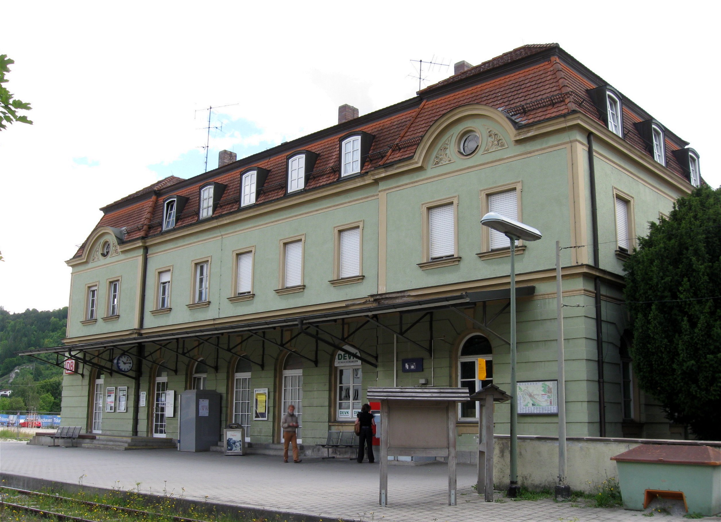 Bahnhofplatz 17; Bahnhofsgebäude, zweigeschossiger Trakt mit Eckpavillons und Walmdach, neubarock, erbaut 1898-1900; Güterhalle in Massivbauweise mit Verladerampe und Büro in Holzbauweise unter gemeinsamem flachgeneigtem Satteldach, 1898-1900.This is a photograph of an architectural monument.